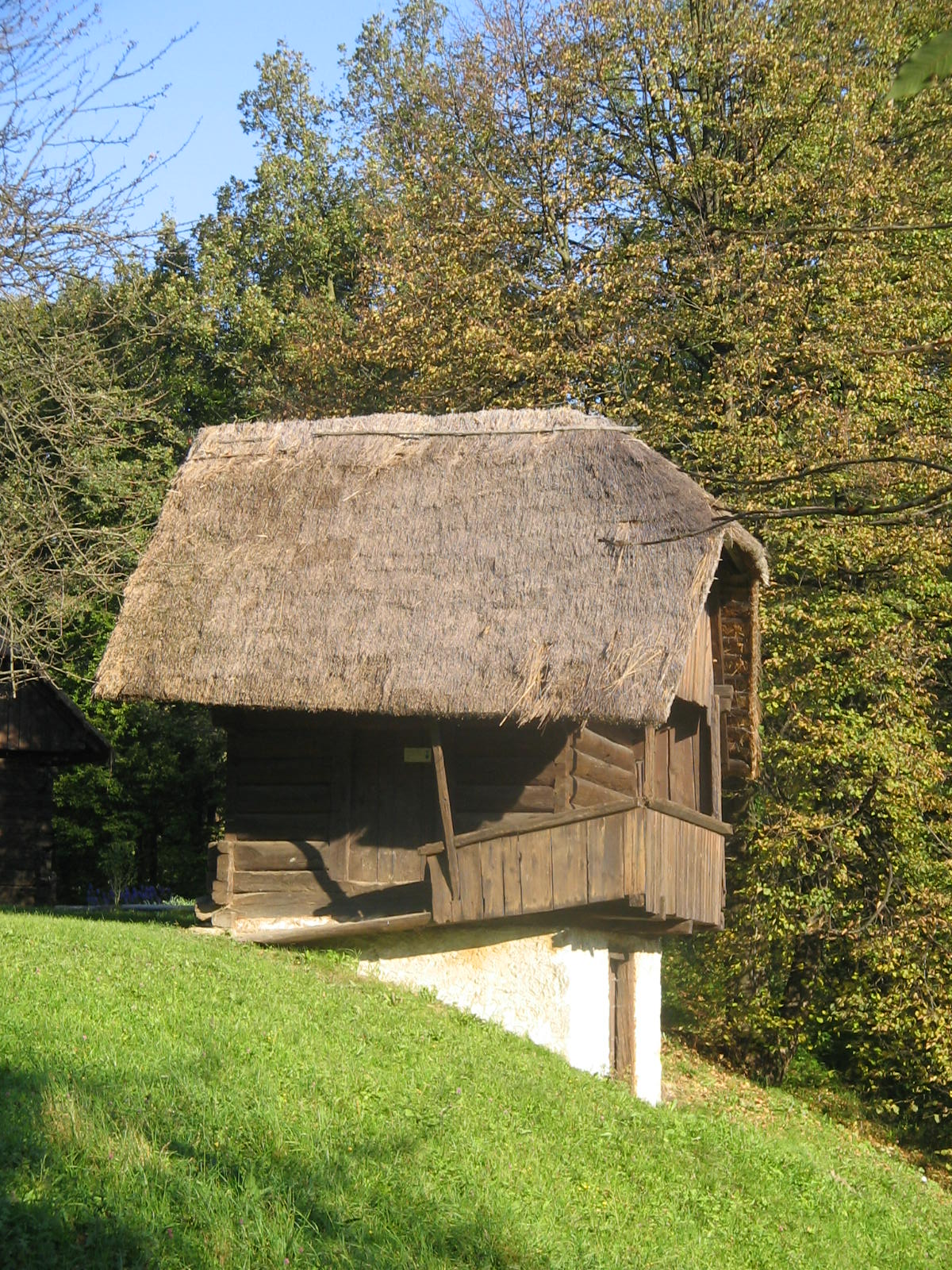 Open air museum Zaprice, 1793 Quelle: eigene Aufnahme 18. 10. 2005 Fotograf: Janez Novak, Ljubljana, Slovenija